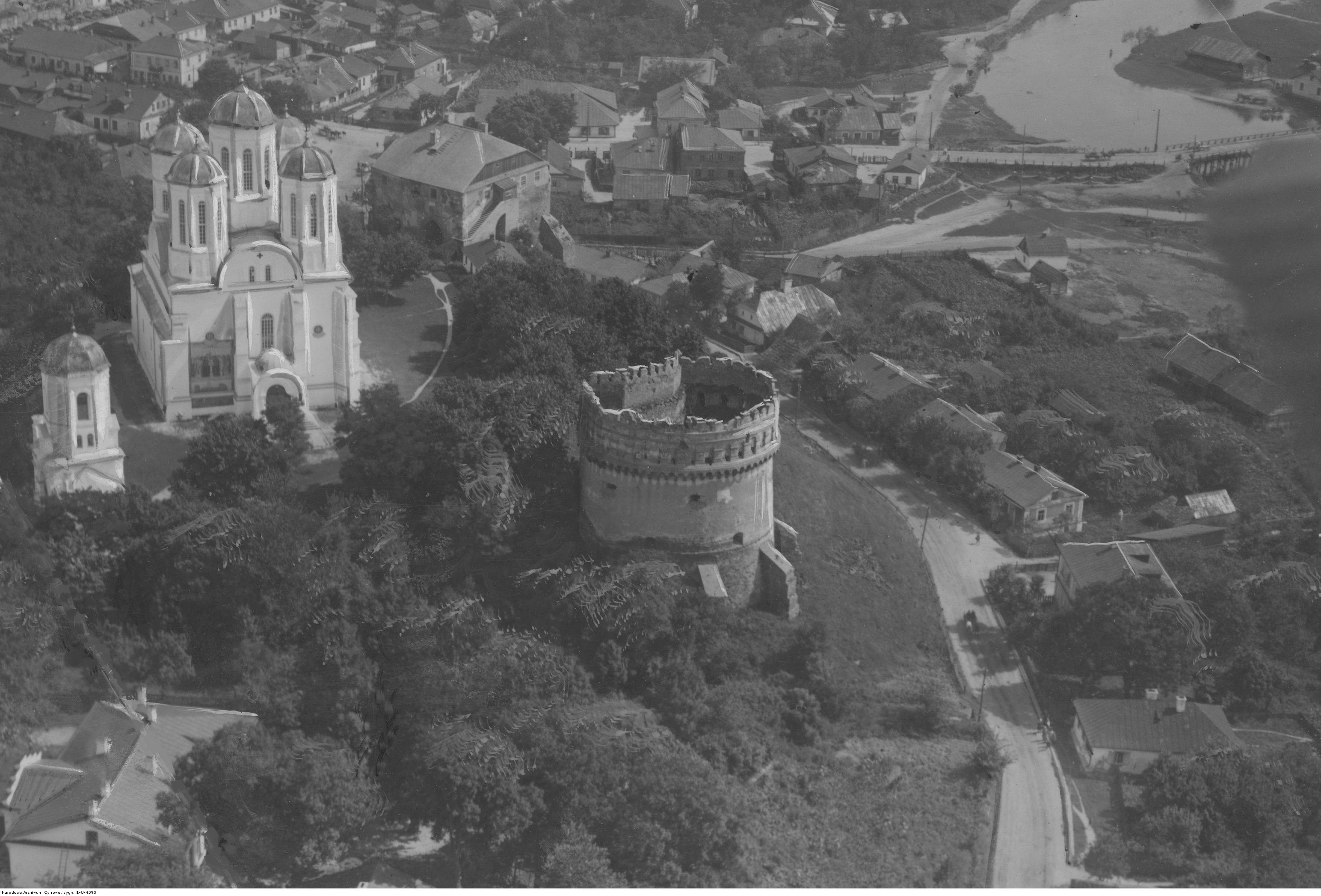 Ostróg - panorama - Sobór Bogajawleński; baszta i zamek Ostrogskich; w tle rzeka Horyń. Koncern Ilustrowany Kurier Codzienny - Archiwum Ilustracji. Sygnatura: 1-U-4590